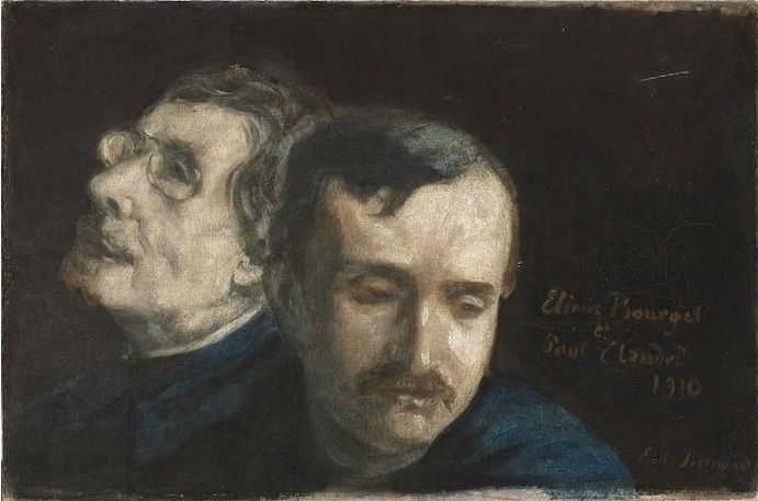 BERNARD Emile,1910 - Double portrait de Paul Claudel et d'Elémir Bourges